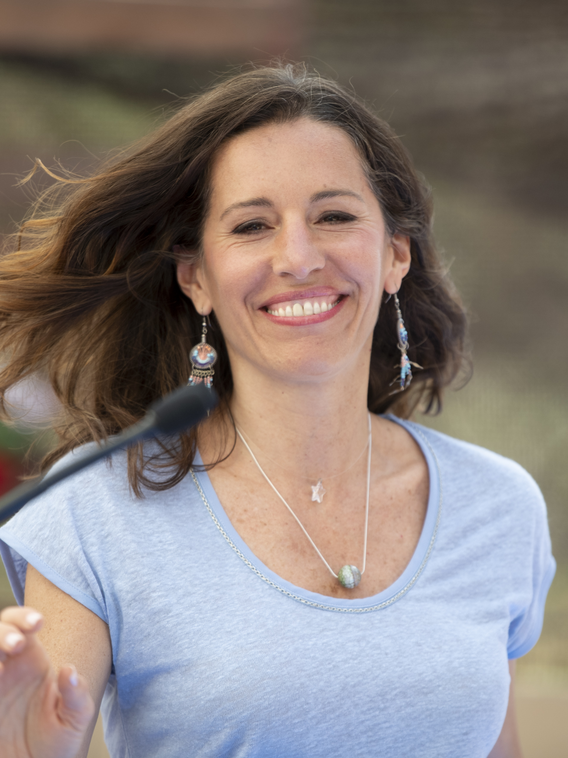 Acto de Ayuso en Galapagar